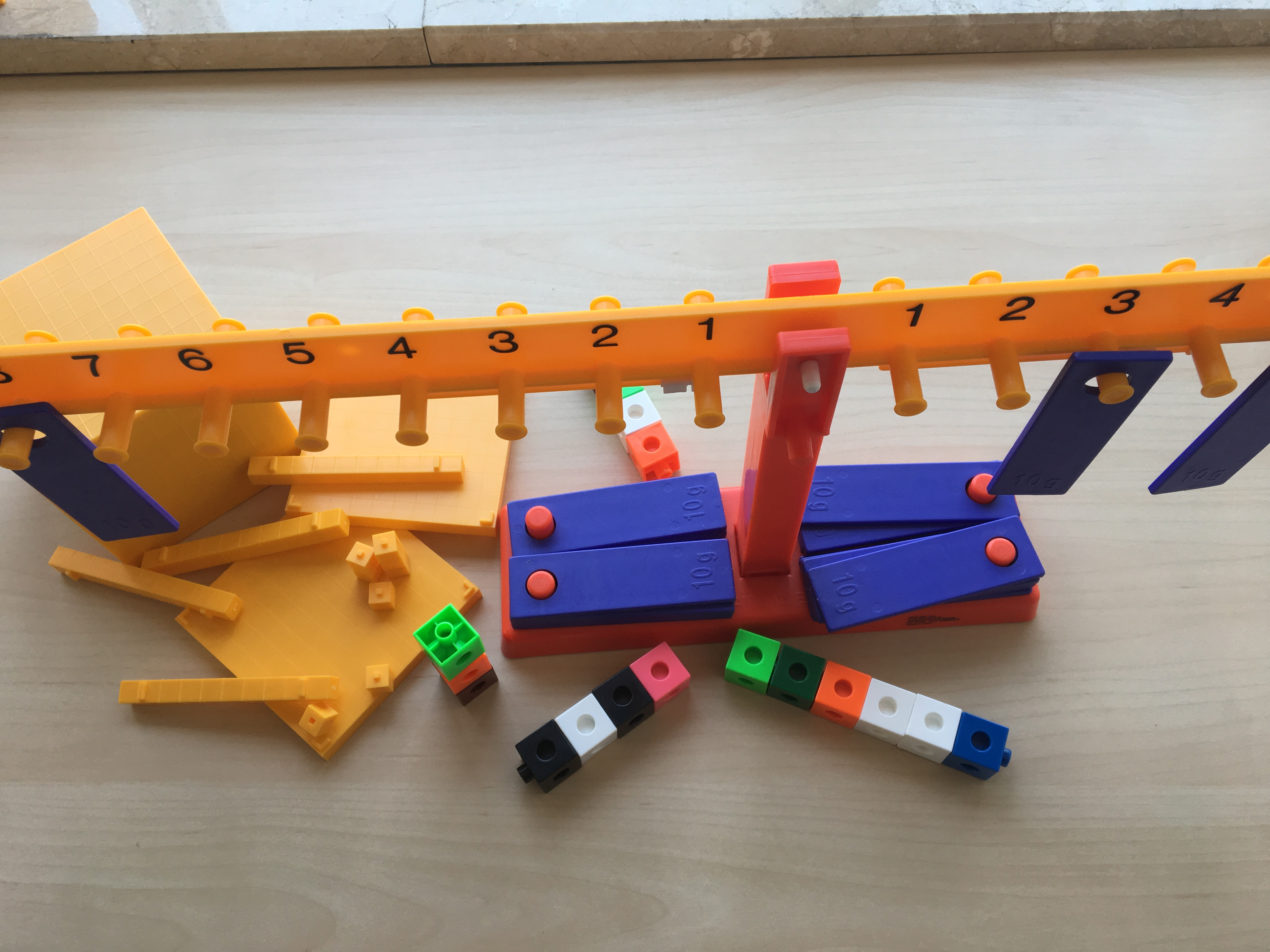 Material manipulativo para "Método Singapur®"